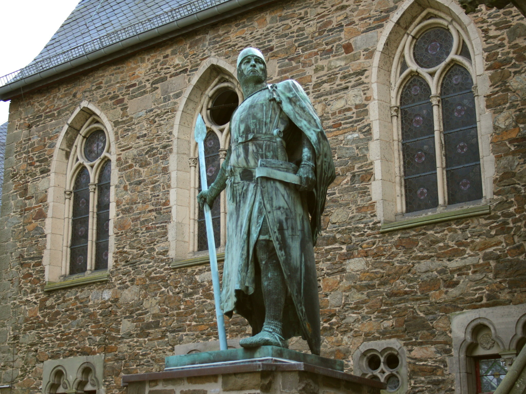 Schloss Burg in Solingen-Burg